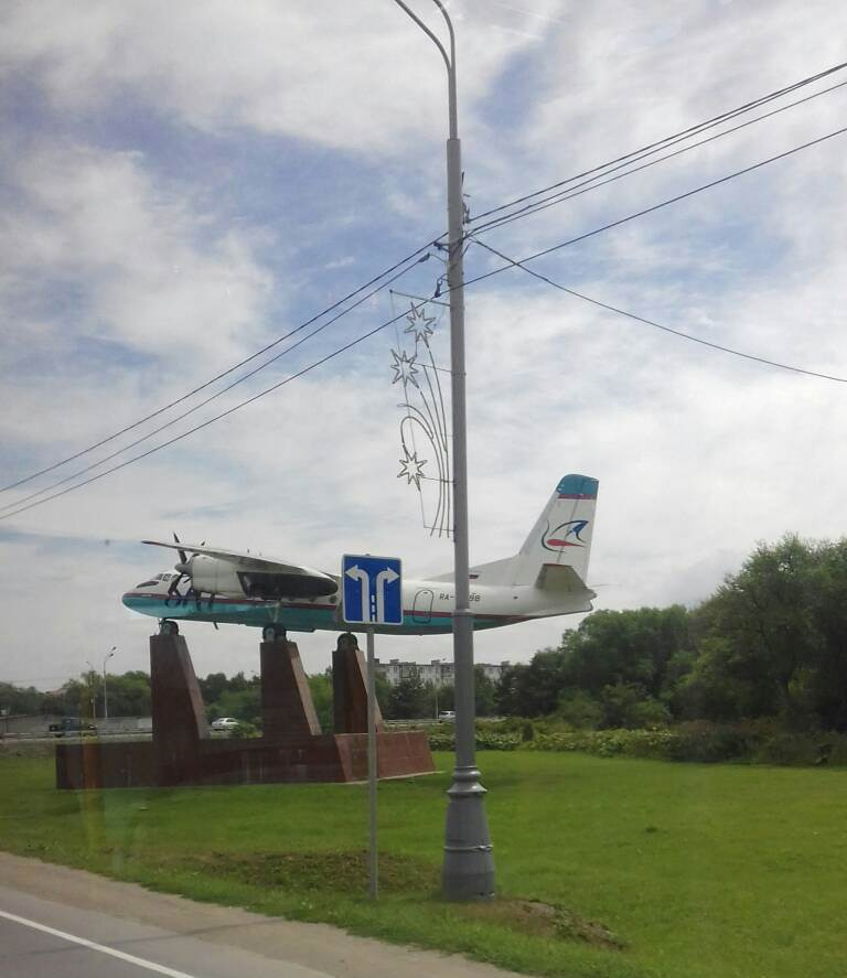 An-24 aircraft on a pedestal at the entrance to the airport